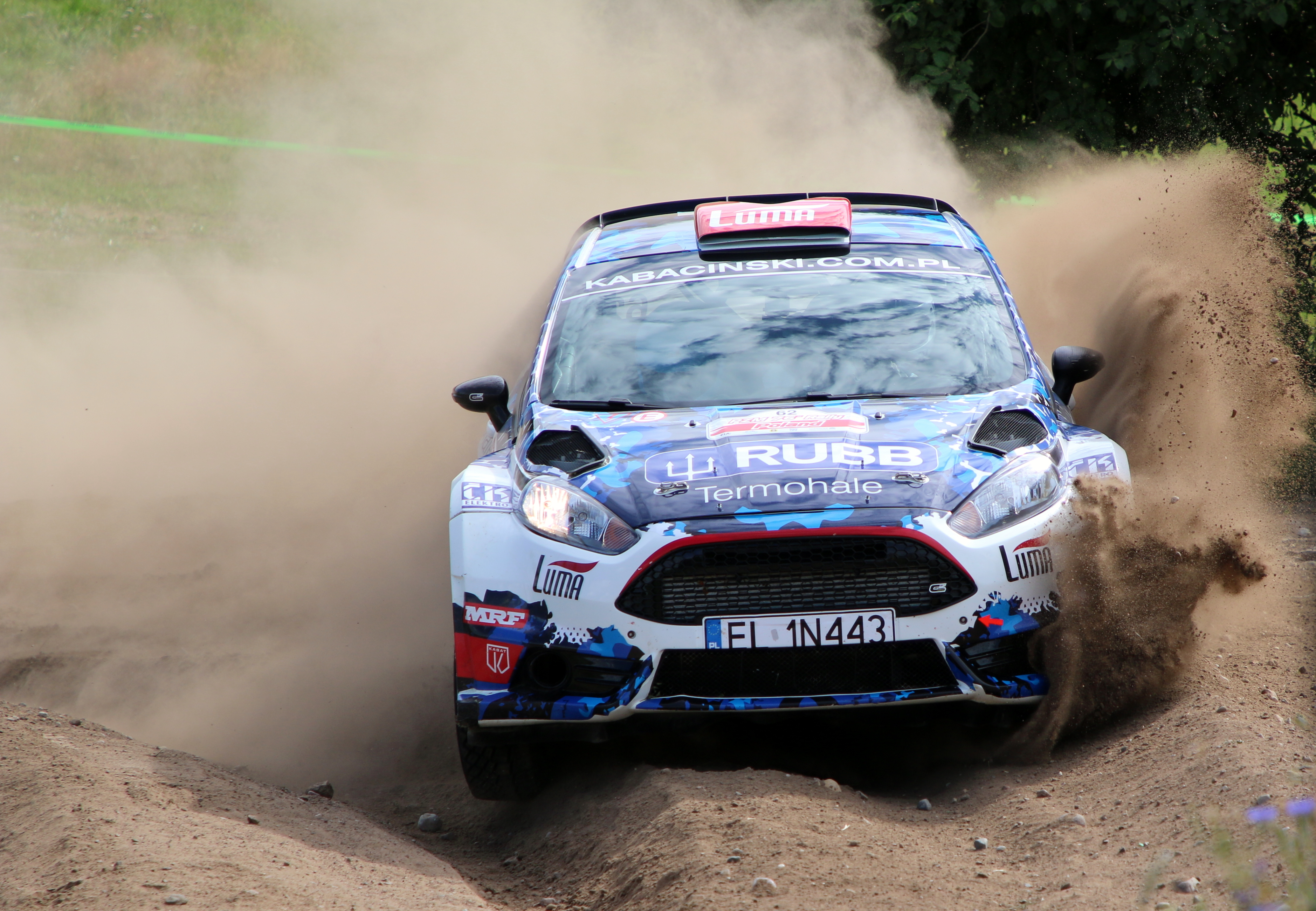 Łukasz Kabaciński podczas Rajdu Polski 2019